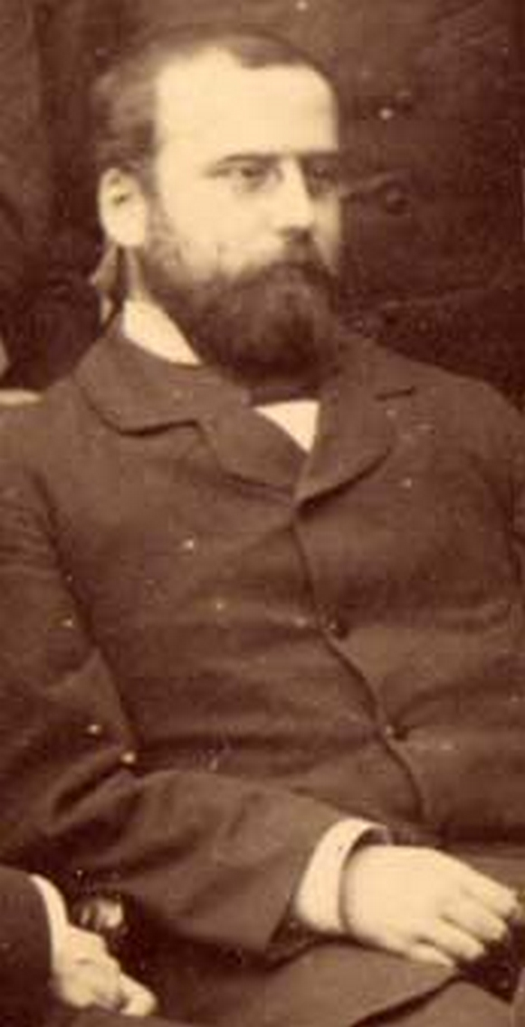 Alfred Soubeiran, né en 1855 et mort en 1936, est une personnalité du Bassin minier du Nord-Pas-de-Calais.